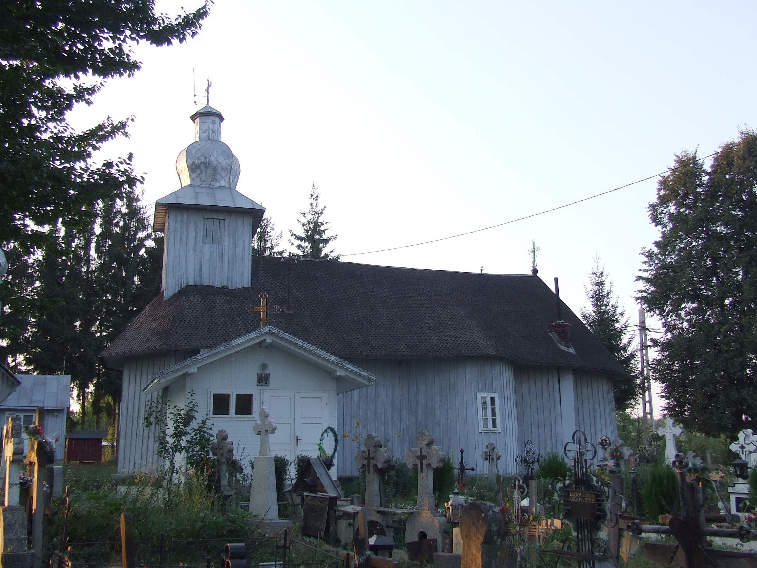 Biserica de lemn din Groşi. judeţul Neamţ